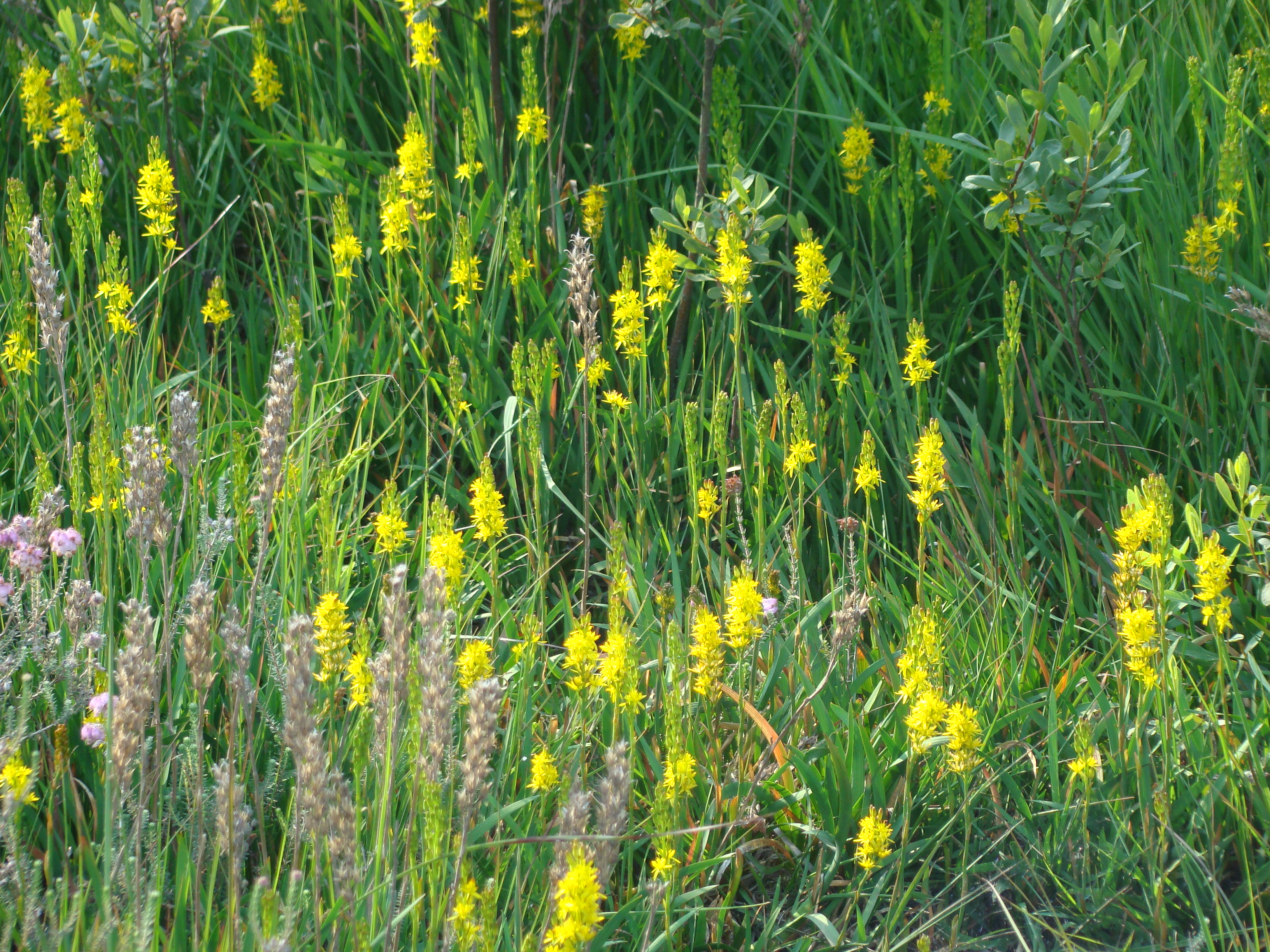 Moorlilienbestand im Naturpark Südheide